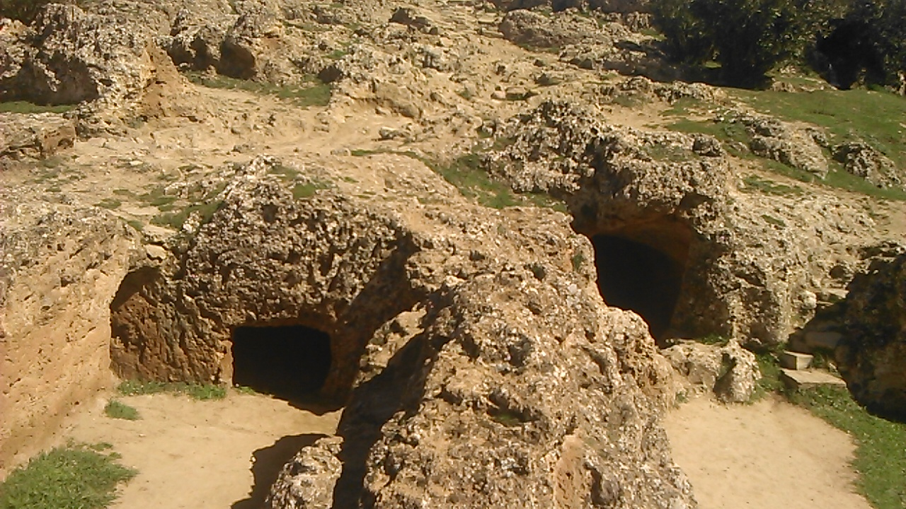 Grottes Ibn Khaldoun reflètent l' importante période historique précieuse histoire de l'Algérie.